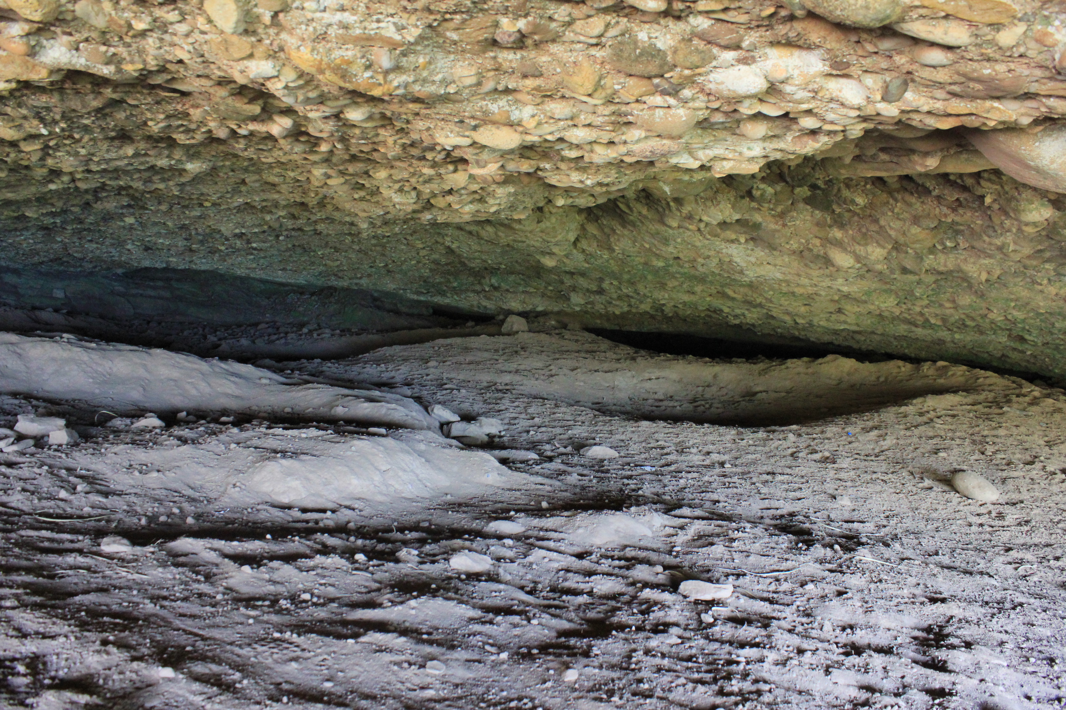 Blick in die Höhle Steigelfadbalm, Fundstelle von Höhlenbärenknochen.